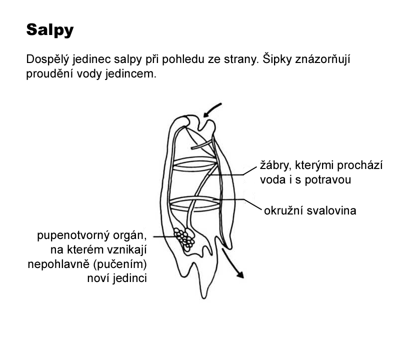 Salpy, nepohlavní jedinec při pohledu ze strany